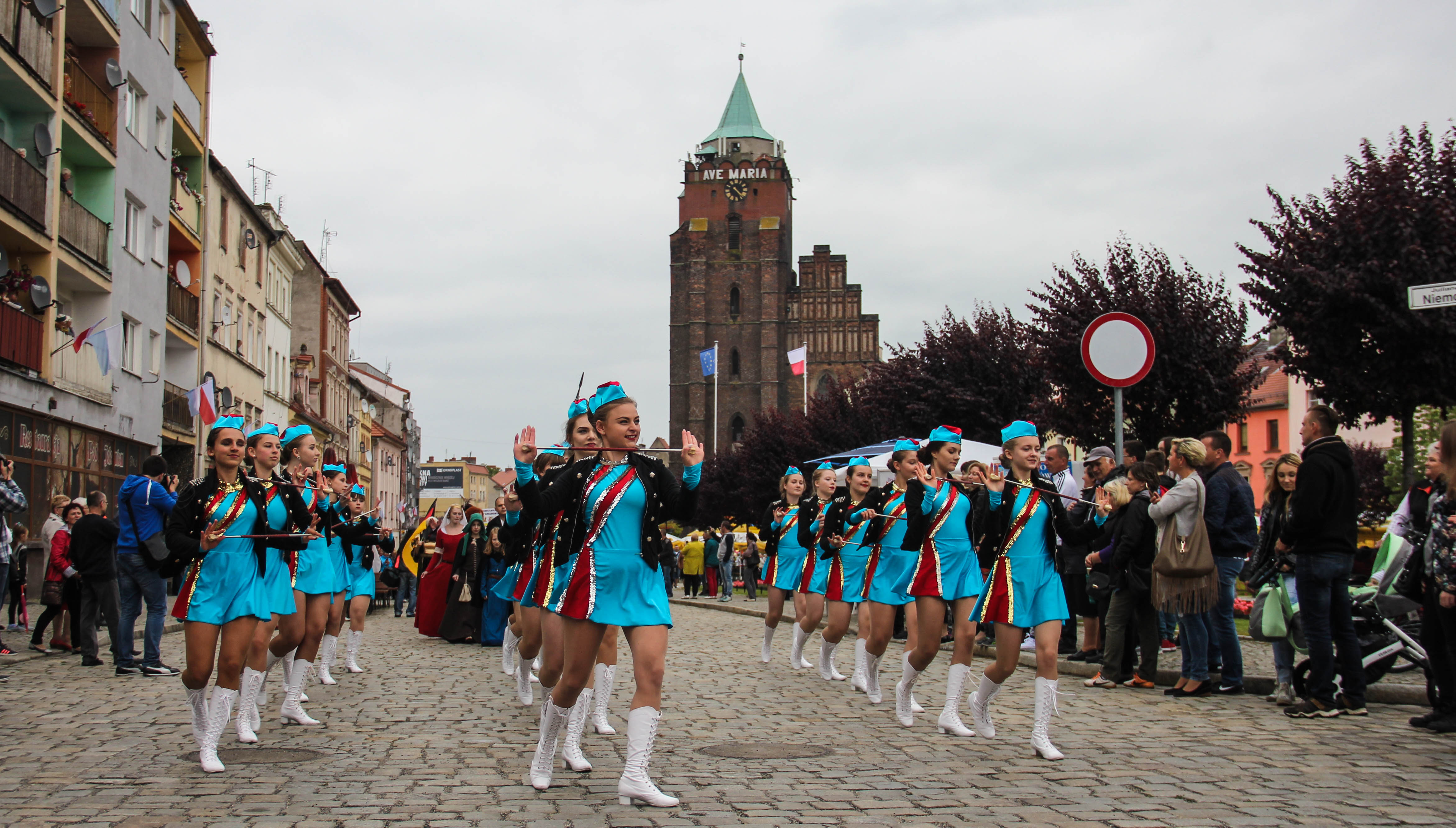 Korowód Ogrodów otwierający Dni Chojnowa w 2017 roku